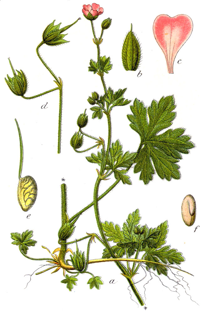 Geranium divaricatum Ehrh. Original Caption Spreizendes Geranium, Geranium divaricatum